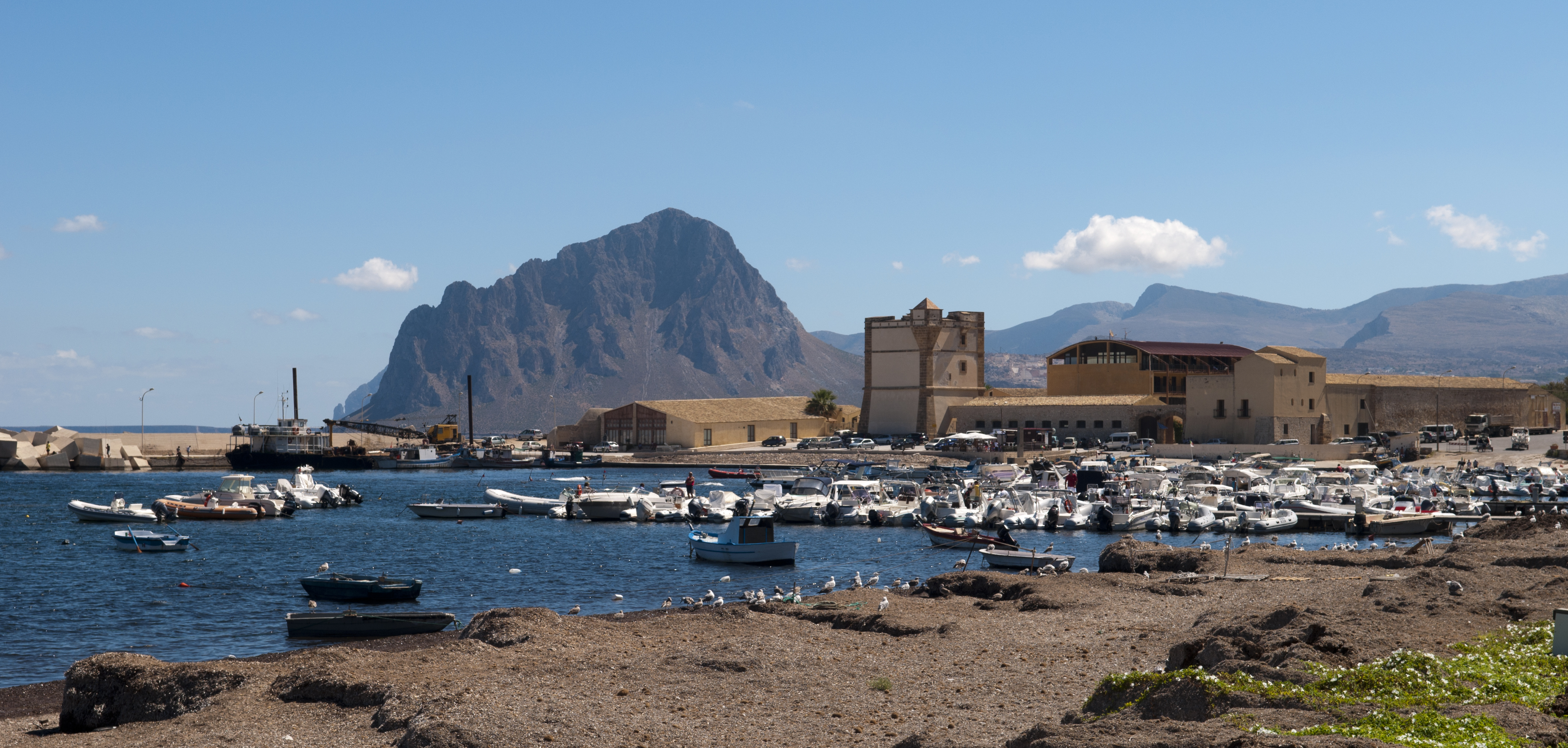 Tonnara di Bonagia, Sicily, Italy